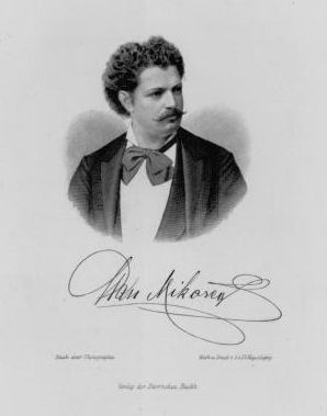 Der Tenor Max Mikorey, deutscher Sänger, Stahlstich von August Weger (1823–1892), deutscher Maler